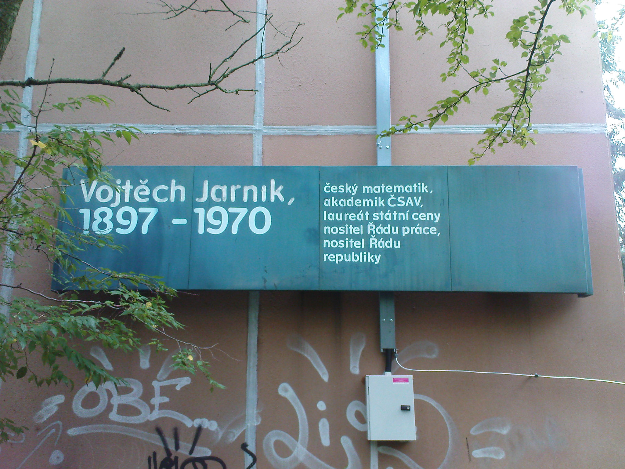 Informace o Vojtěchu Jarníkovi (Praha, Chodov)